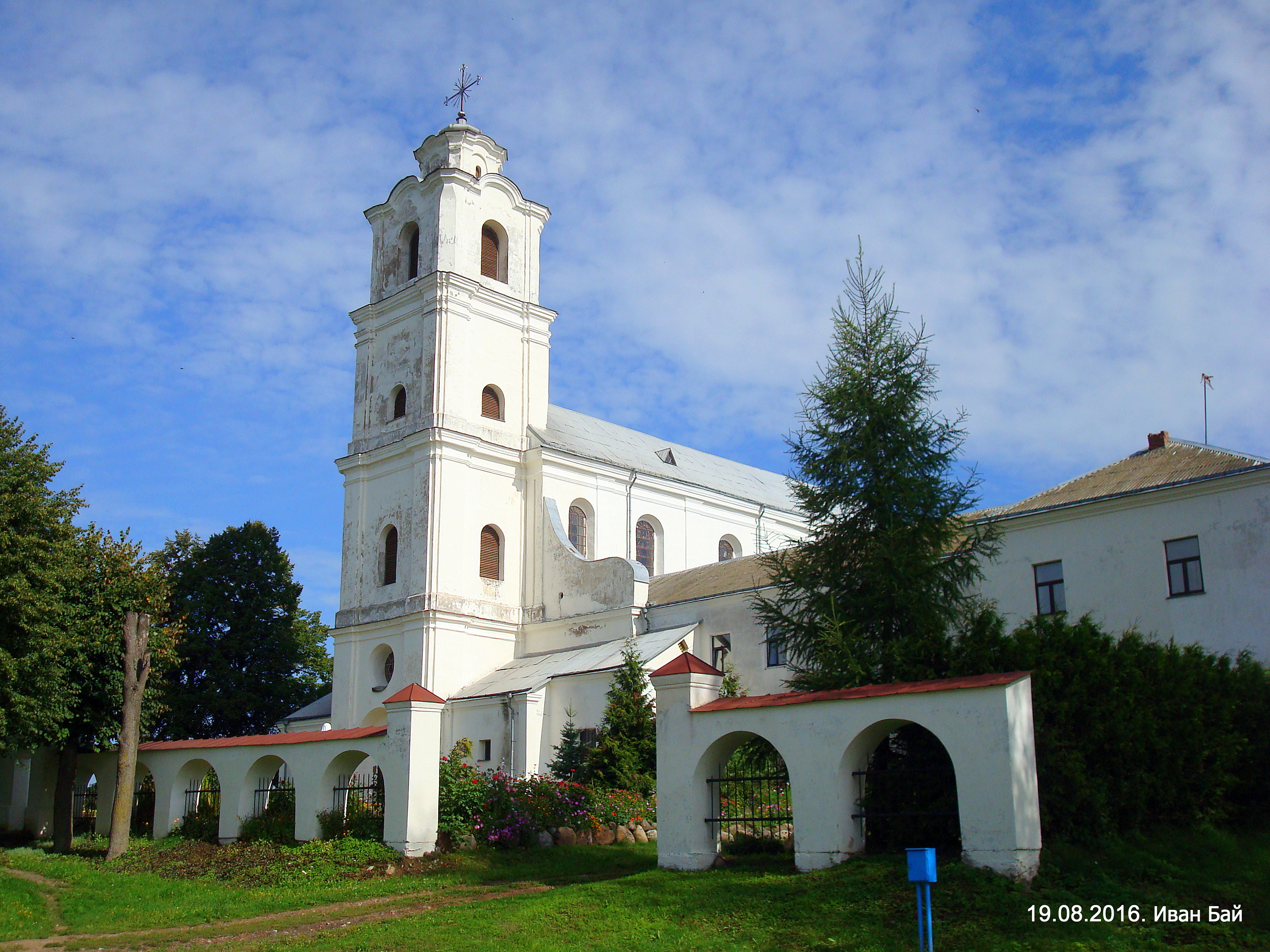 Костёл и монастырь